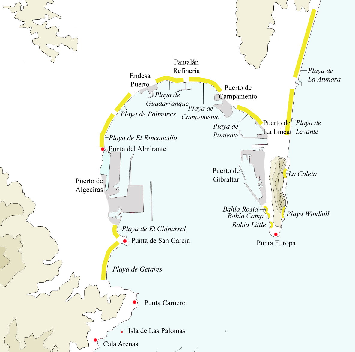 Mapa indicativo de los accidentes costeros de la bahía de Algeciras